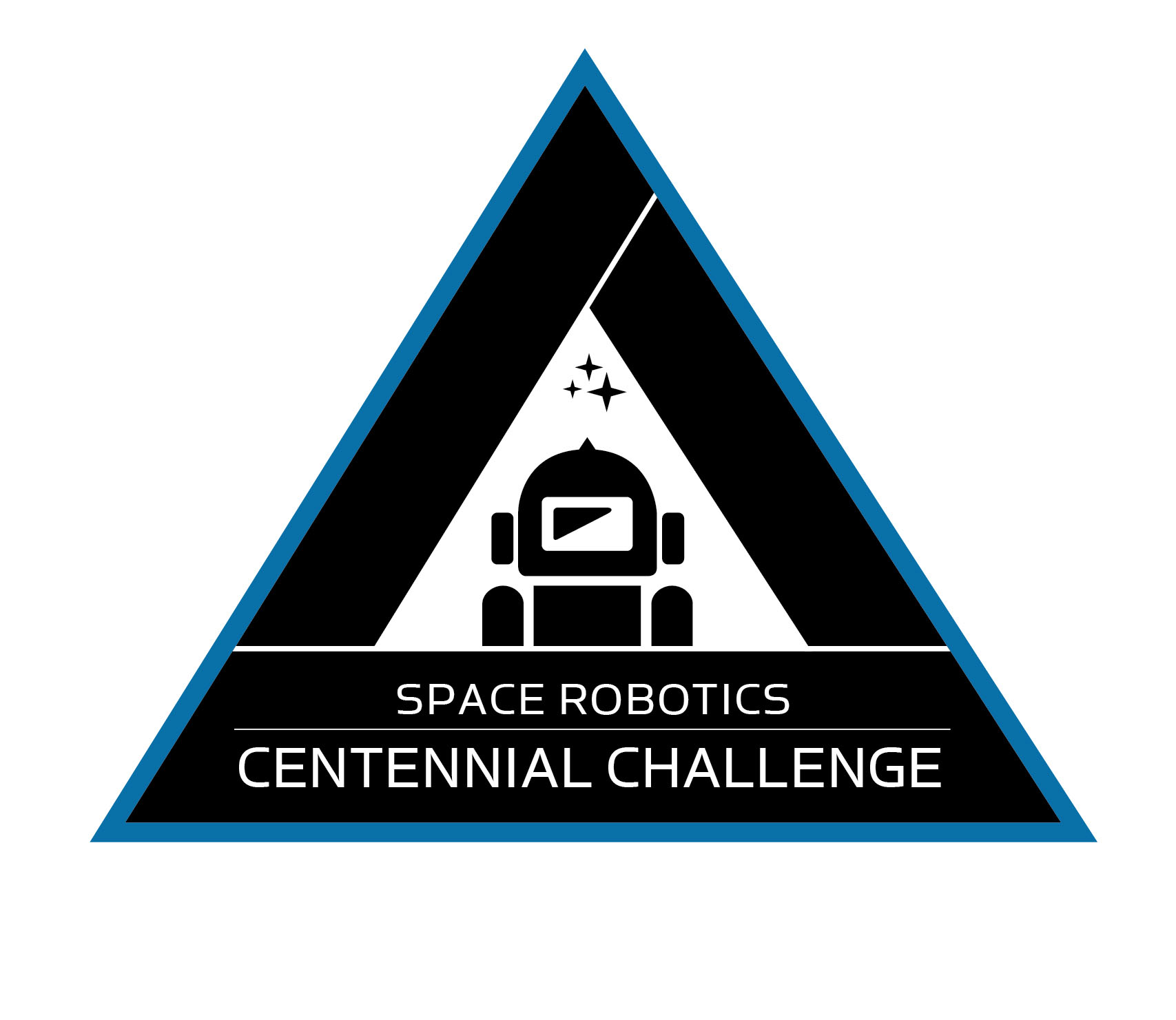 Space robotics challenge badge